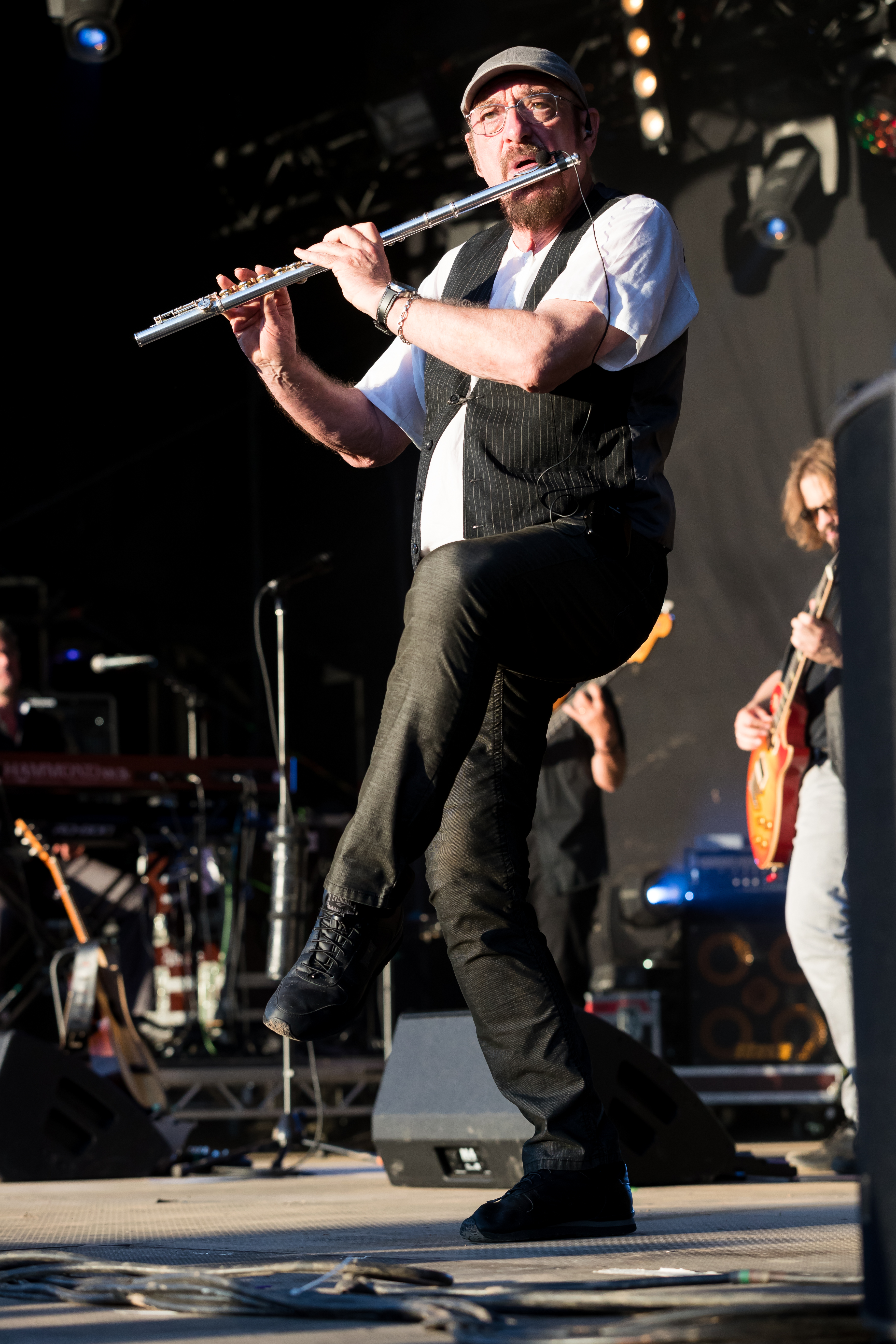 Jethro Tull’s Ian Anderson during Burg Herzberg Festival at Hessen, Breitenbach am Herzberg, , Germany on 2017-07-29, Photo: Sven Mandel